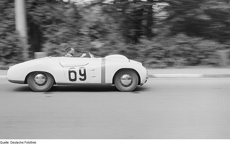 Original image description from the Deutsche FotothekStadtparkrennen "Rund um das Scheibenholz"